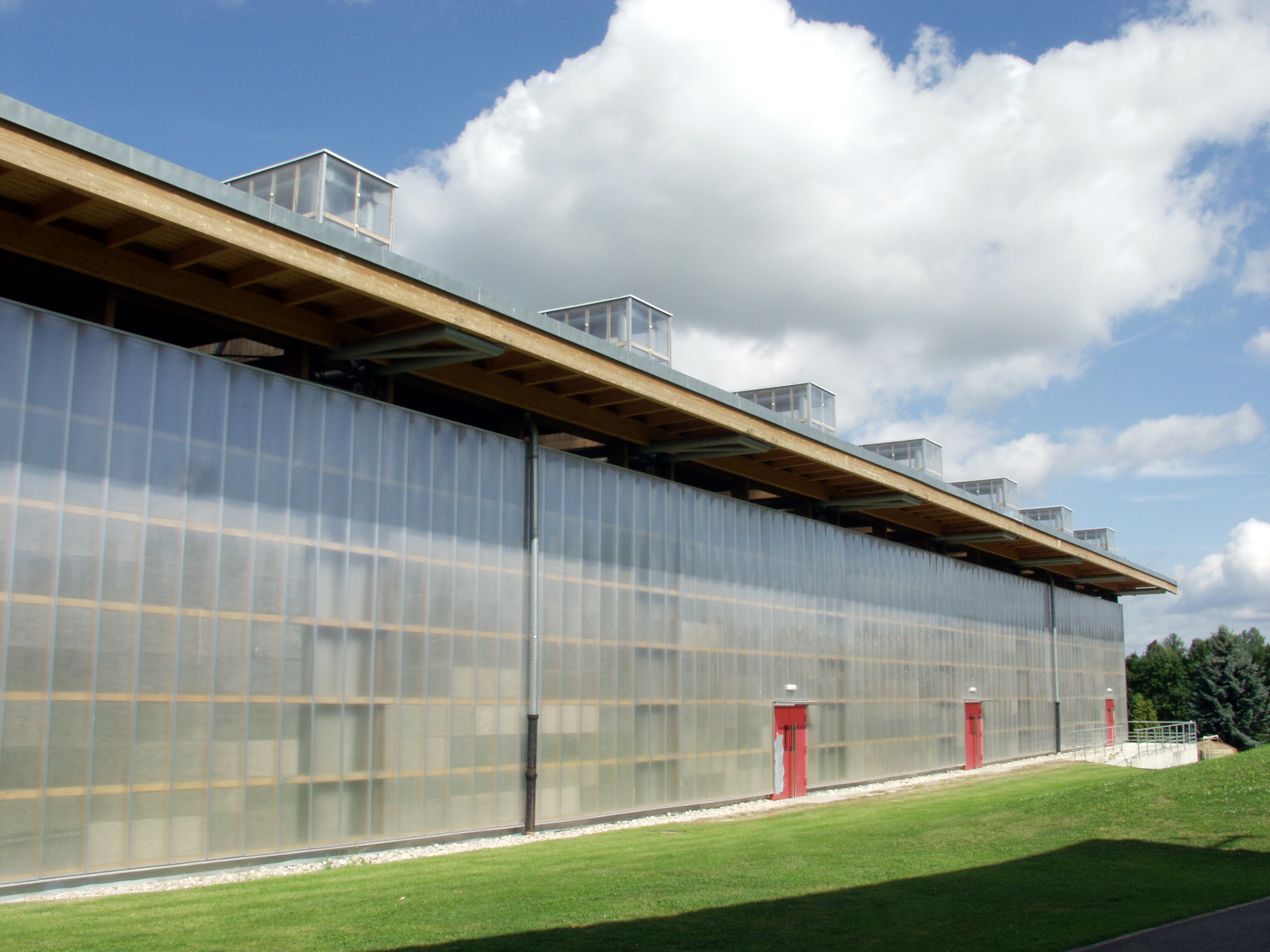 Zimní stadion v Litomyšli. Zastřešení navrhla architektonická kancelář Burian - Křivinka. Realizováno v roce 2004